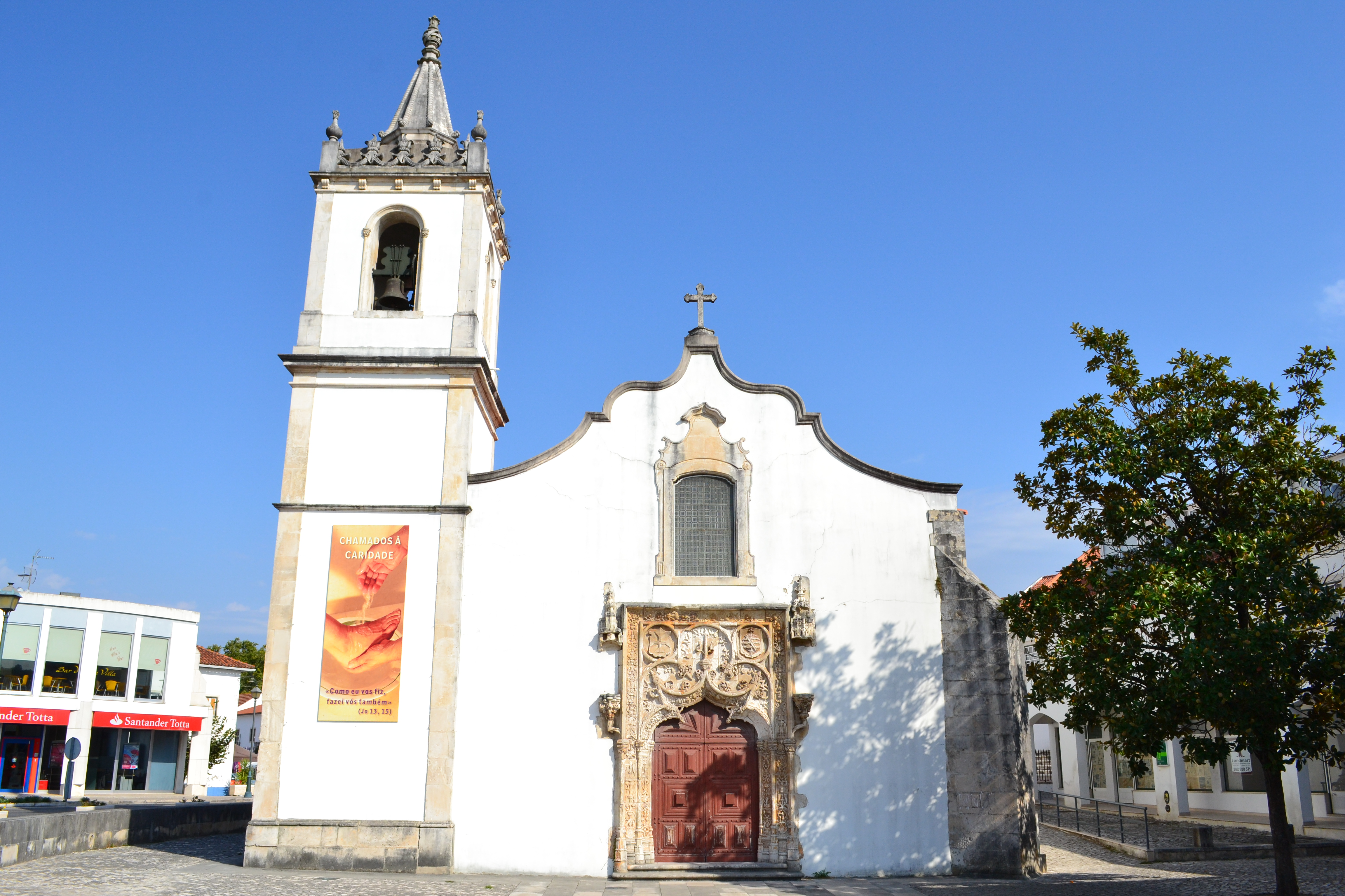 Fachada da Igreja da Exaltação de Santa Cruz na Batalha This file was uploaded for Wiki Loves Monuments in Portugal with the unique identifier 71166.